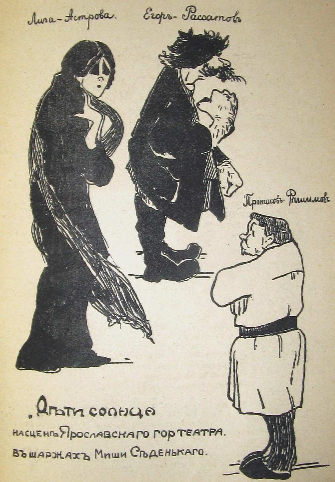 одна из ранних карикатур на пъесу А.М. Горького "Дети солнца"